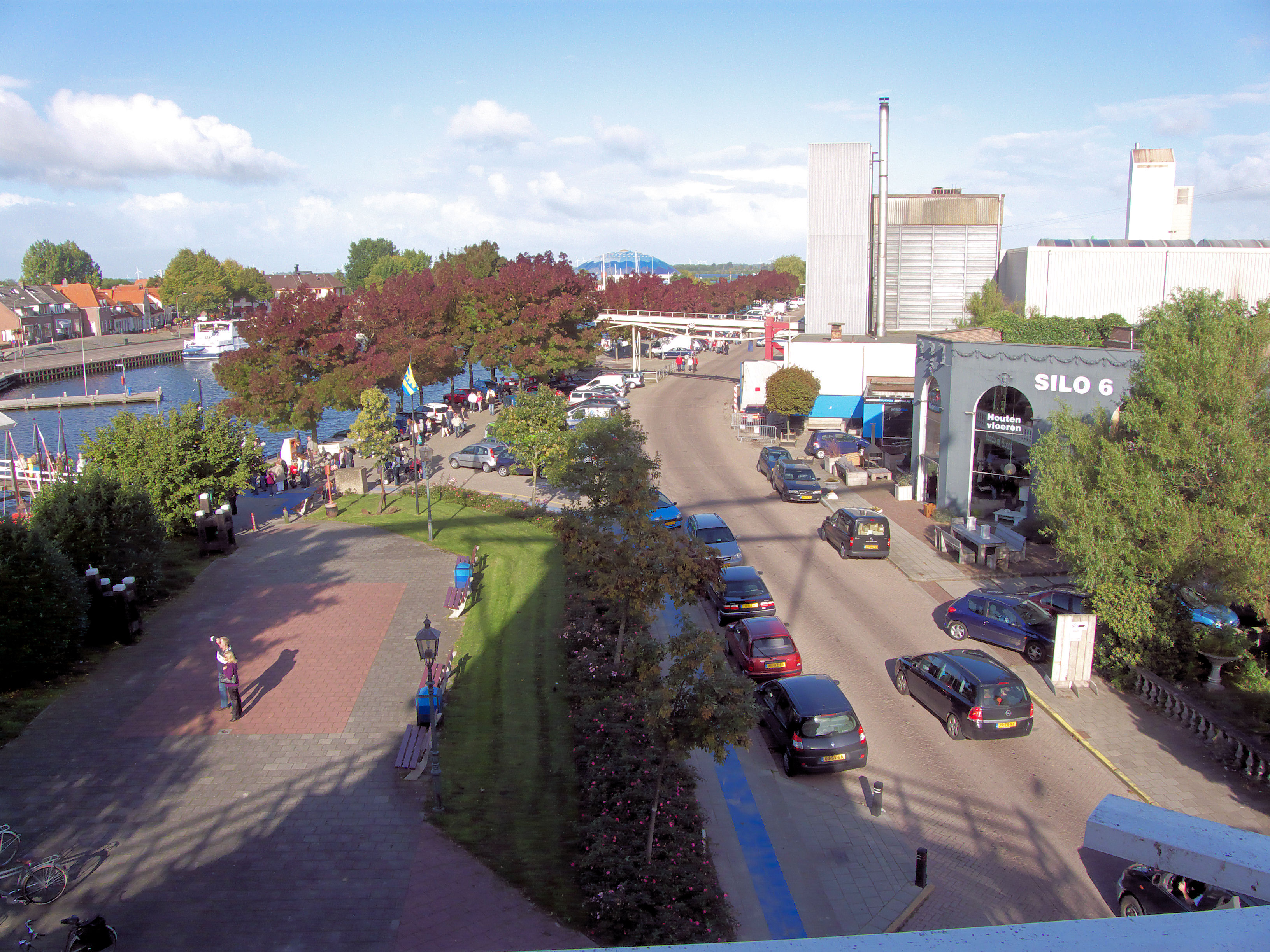 Molen De Hoop, Harderwijk, haven gezien van uit de molen